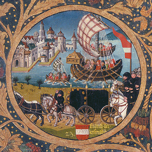 Friedrich I. auf Kreuzfahrt in das Heilige Land, Babenberger Stammbaum, um 1490, Stift Klosterneuburg.